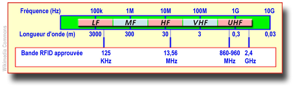 Rango de las frecuencias RFID más comunes